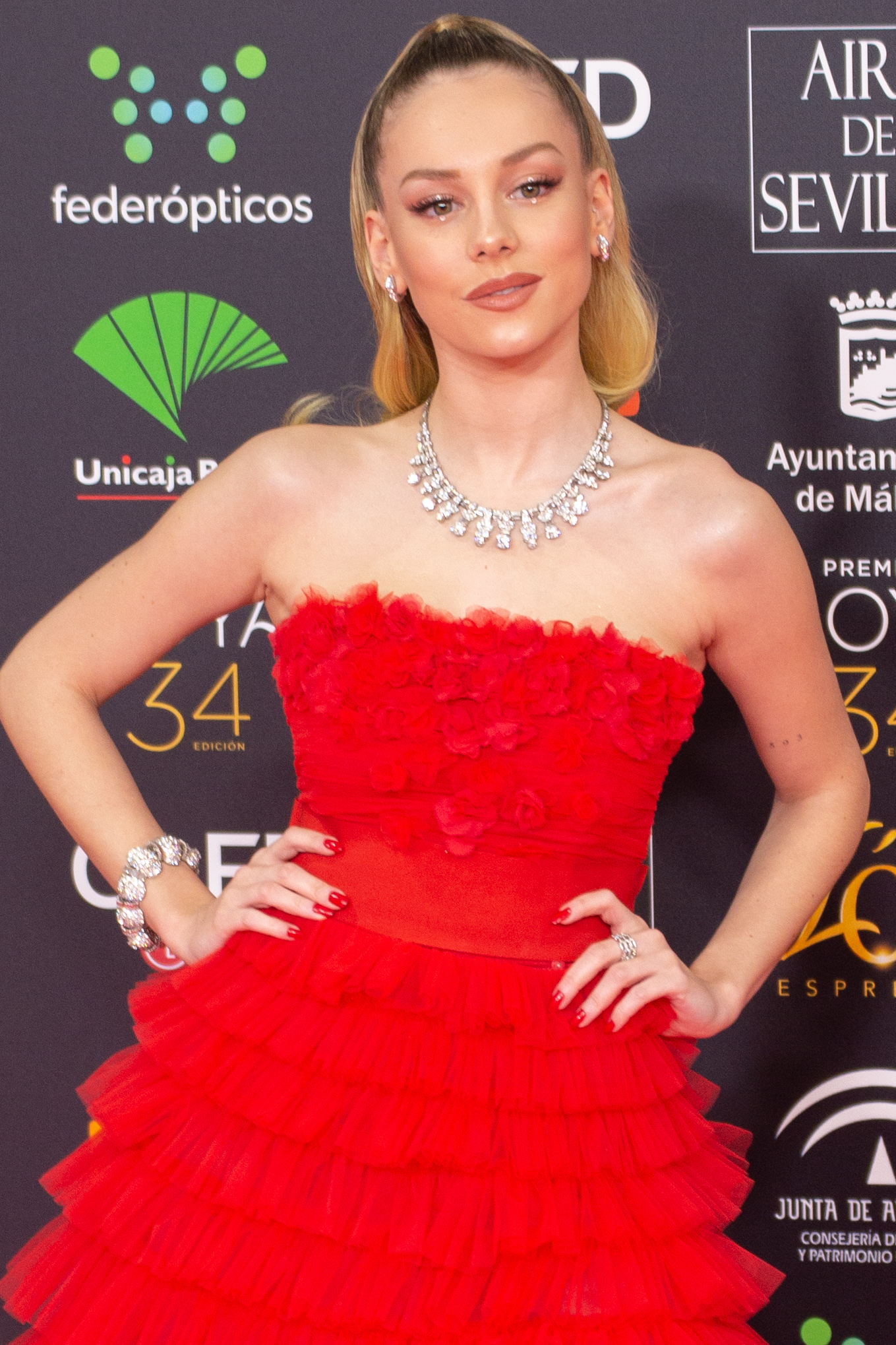 Ester Expósito en la alfombra roja de la ceremonia de entrega de los Premios Goya 2020, celebrados en Málaga